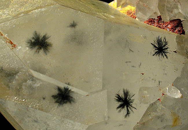 kwarc i hollandyt, pochodzenie Madagaskar; autor zdjęcia Stowarzyszenie Spirifer